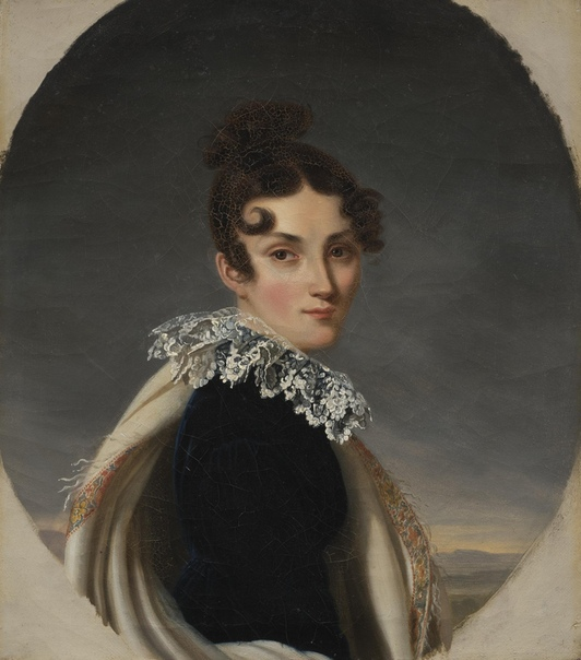 Мария Павловна Олсуфьева, ур. Каверина (1798-26.05.1819), была первой женой графа Александра Дмитриевича Олсуфьева (1790-1831); дочь действительного тайного советника, сенатора и калужского губернатора Павла Никитича Каверина (1763-1853) и Анны Петровны Корсаковой (ум.1808), побочной дочери Корсакова, воспитанницы Архаровых; сестра Петра Павловича Каверина (1794-1855), члена "Союза благоденствия", дуэлянта и приятеля А.С.Пушкина.